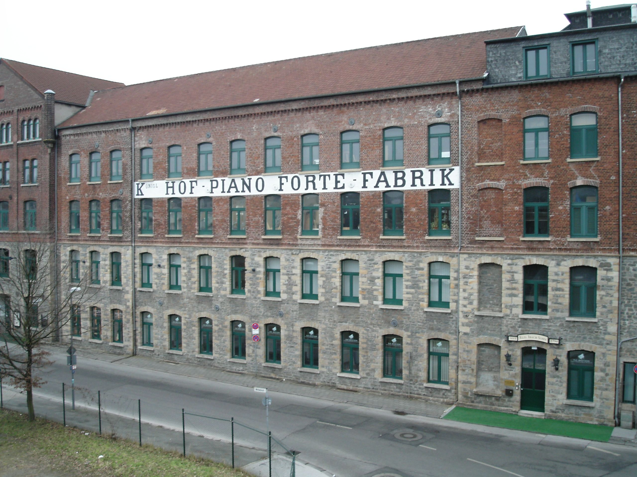 Schwelm Ansicht der Pianofabrik Ibach